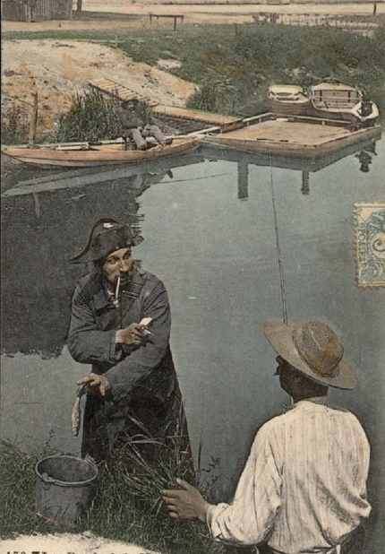 Le garde champêtre effectuant un contrôle de pêche en bordure de rivière avant verbalisation